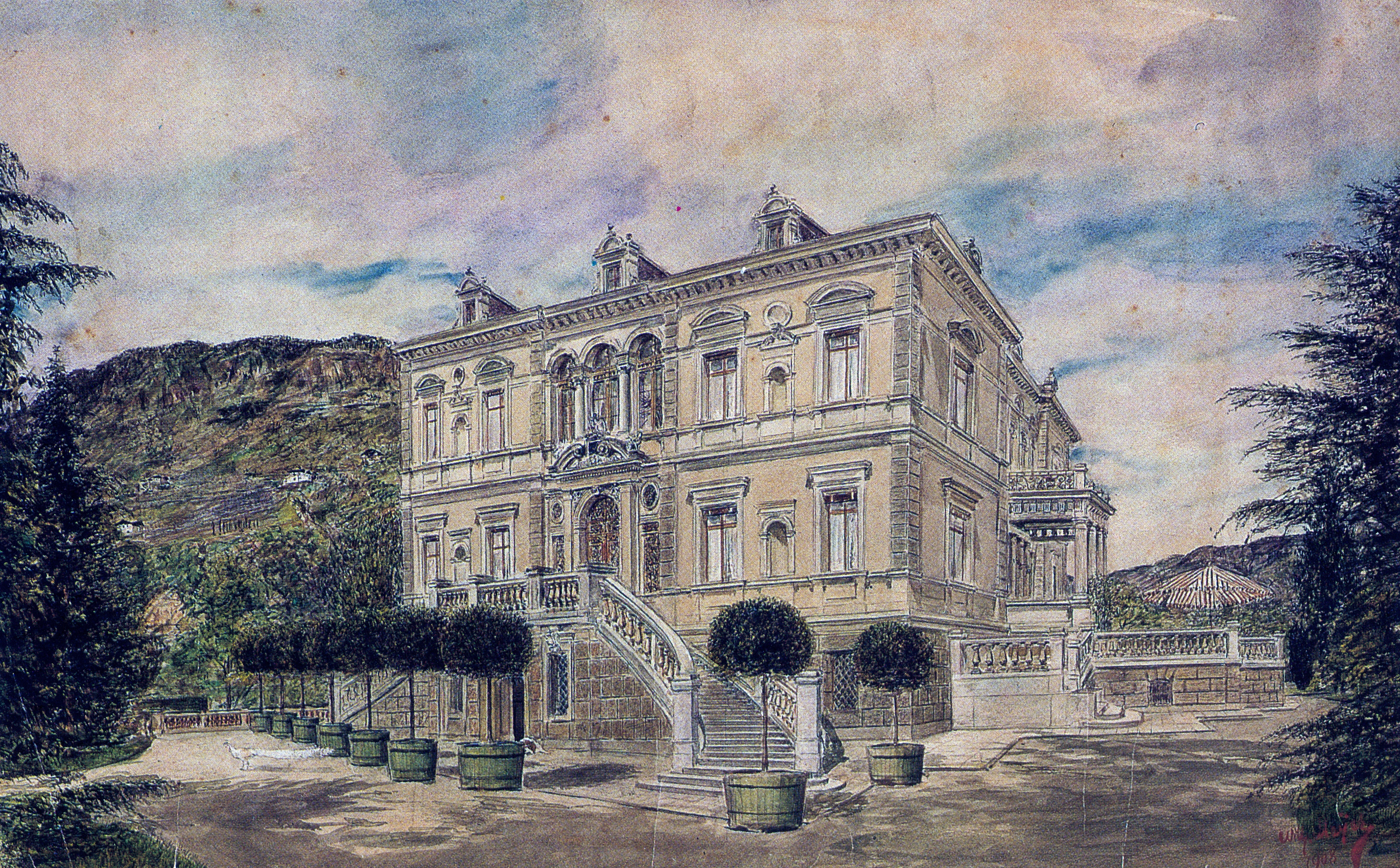 Villa Wendlandt - Aquarell von Willy Mayr 1908